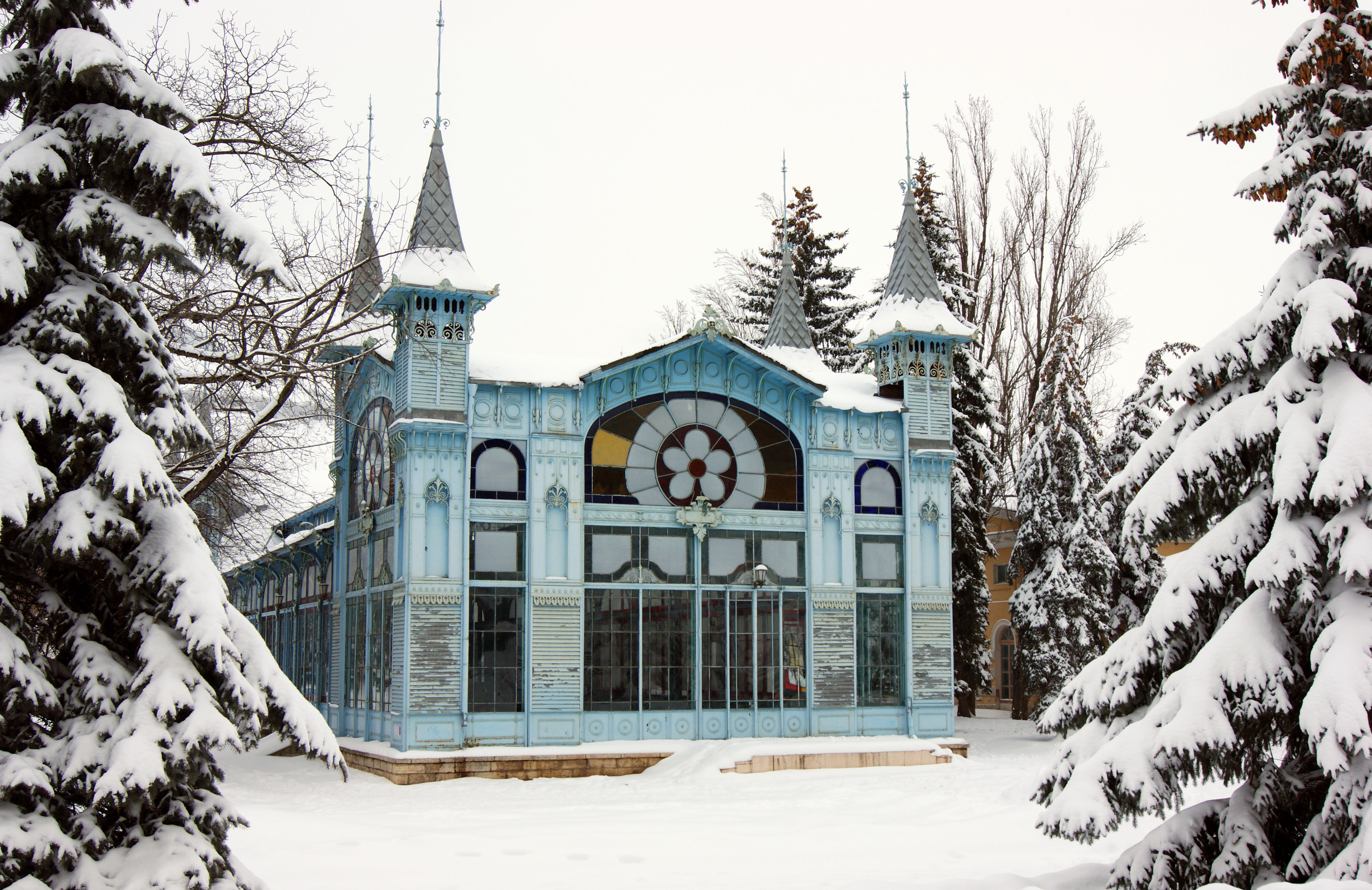 Здание Лермонтовской галереи в Пятигорске, парк Цветник